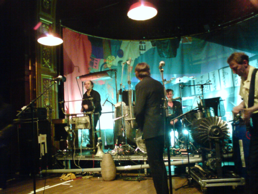 Einstürzende Neubauten performing at Berns